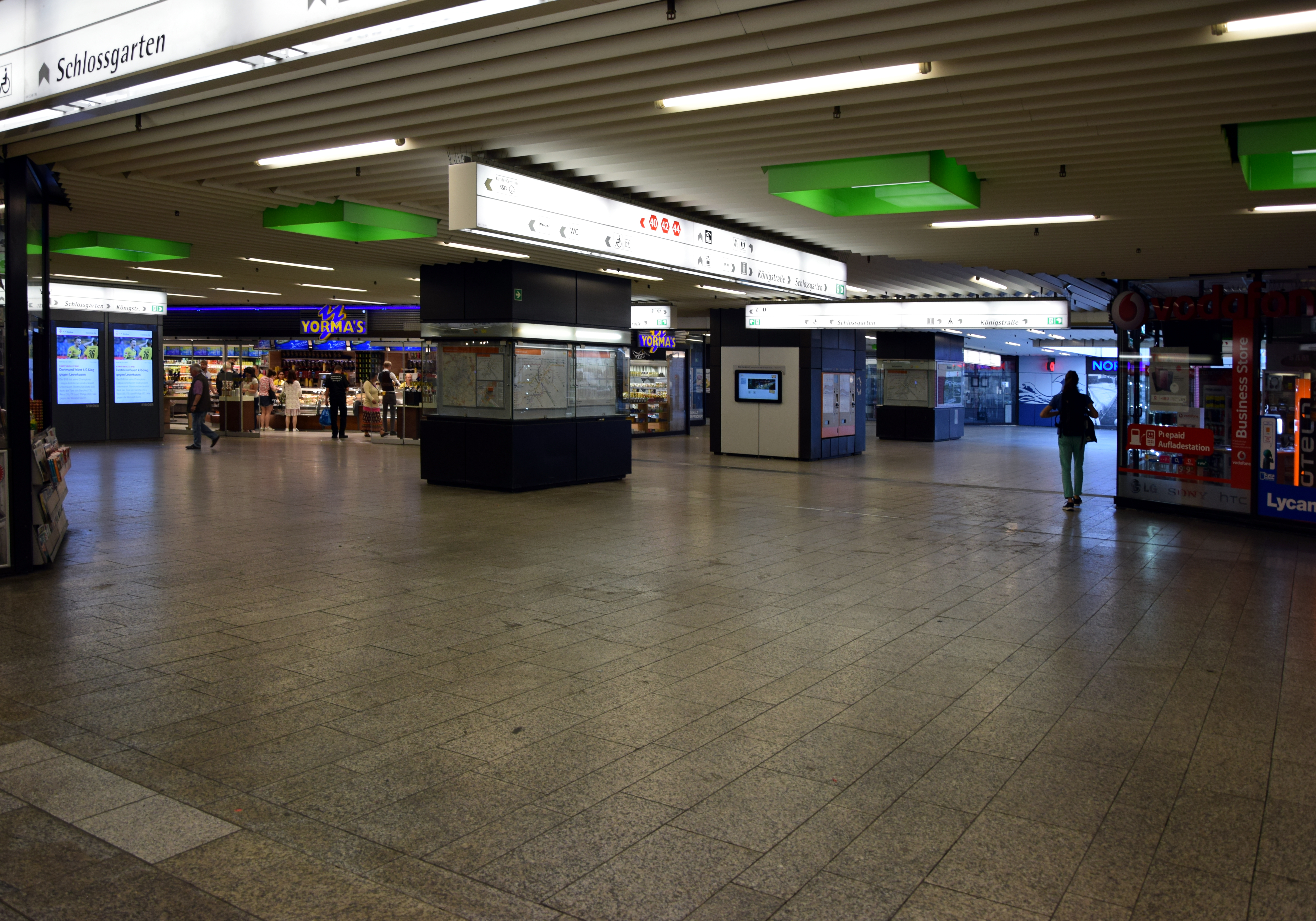 Klett-Passage (eröffnet 1976) in Stuttgart unterhalb des Arnulf-Klett-Platzes mit Abgang zur gleichnammigen Stadtbahnhaltestelle.